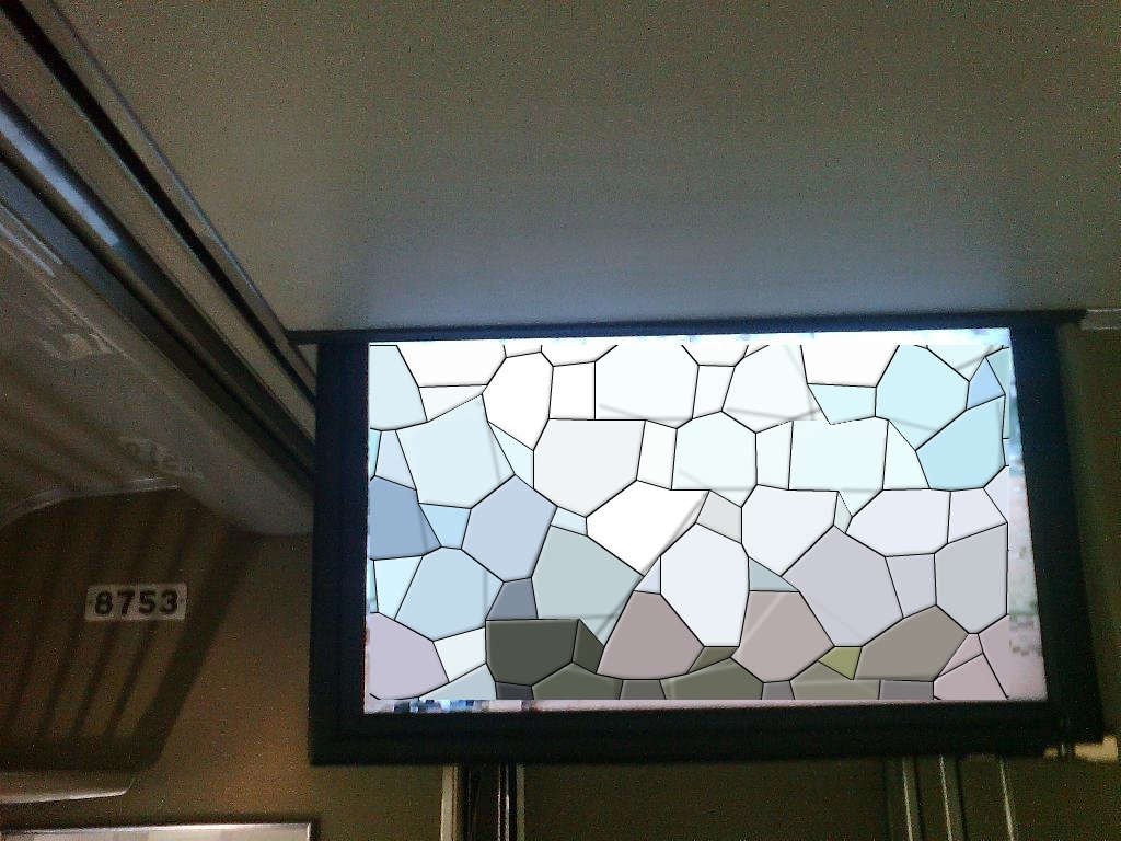 京阪8000系のテレビカーに設置されていた液晶テレビ（モザイク処理済み）。